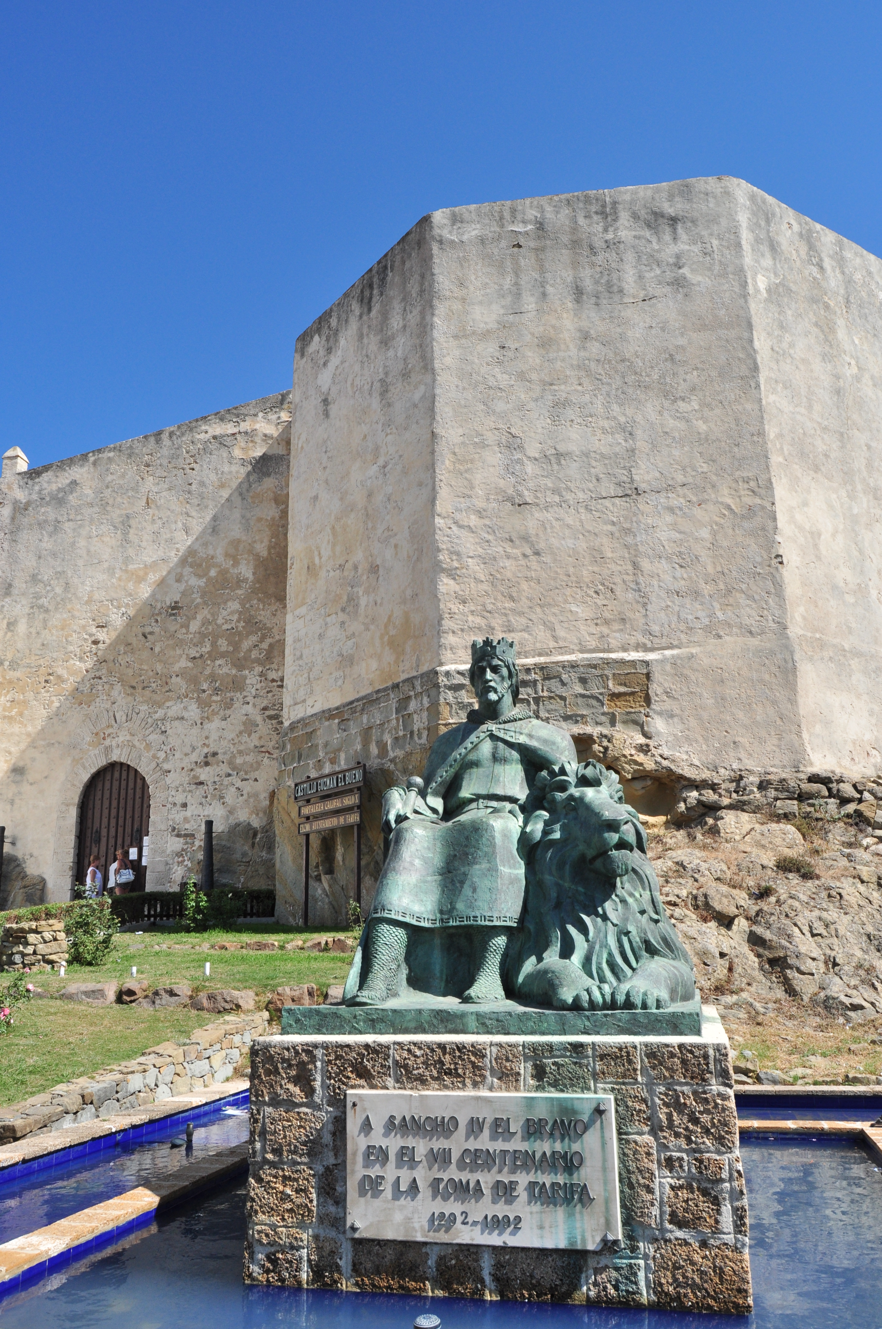 Tarifa - 020